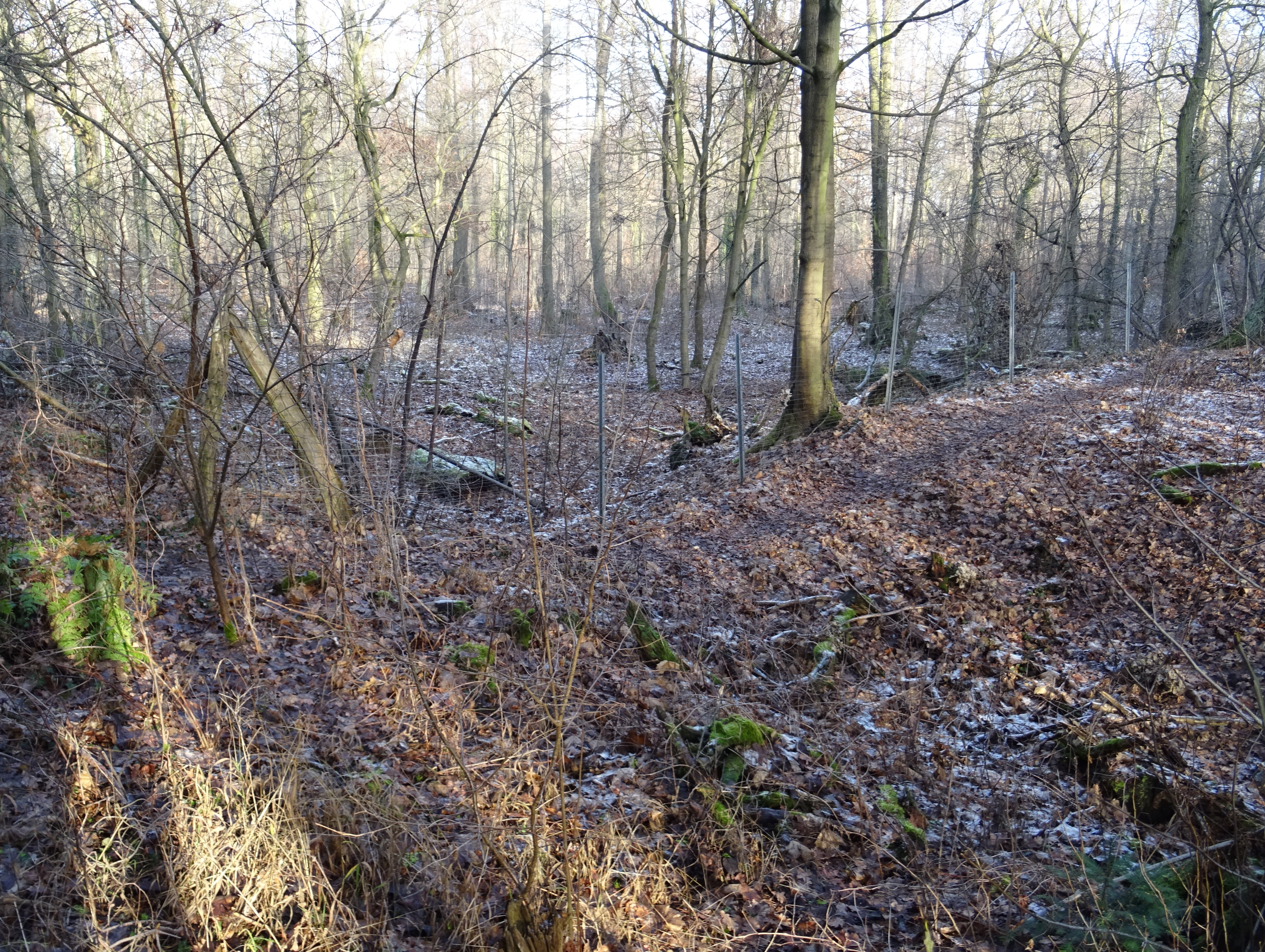 ntenfängerteich südlich von Golm, Stadt Potsdam, am Rand von Wildpark-West, Kulturdenkmal. Südwestecke, Blick vom Fanggraben auf den Teich.